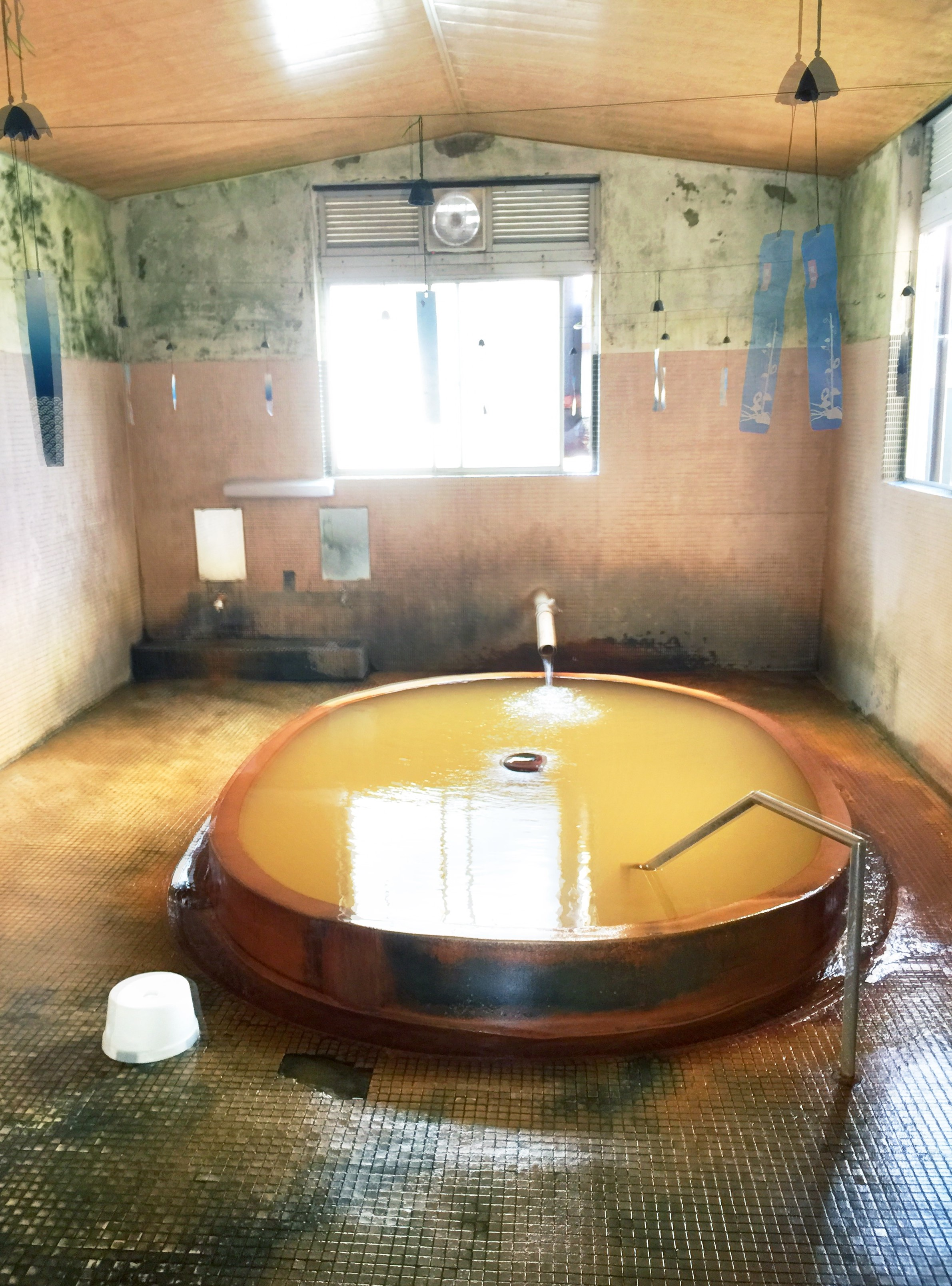 島根県三瓶温泉の共同湯＿亀の湯